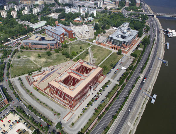 ELTE légi fotó, Budapest